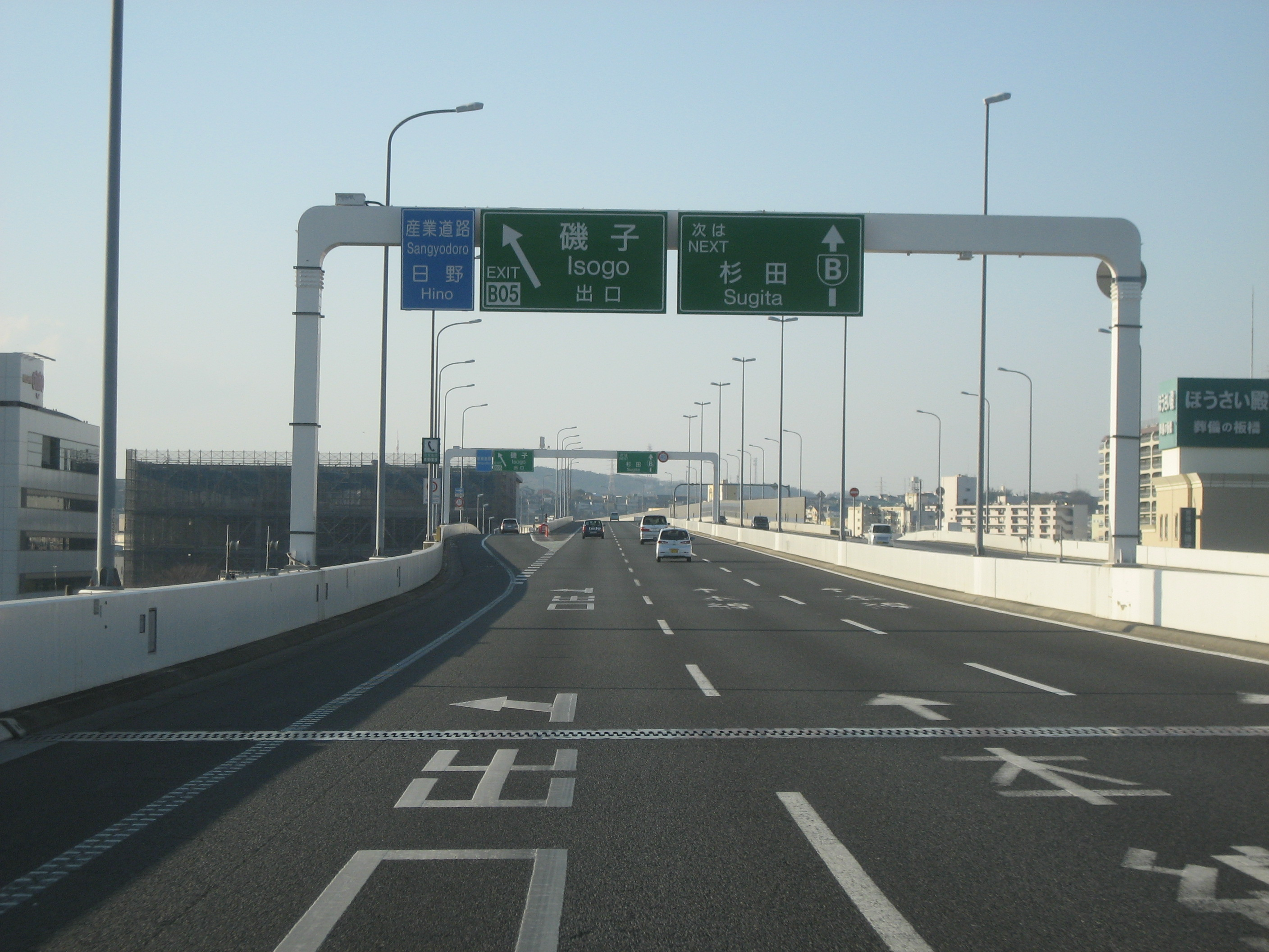 首都高速湾岸線磯子出口付近